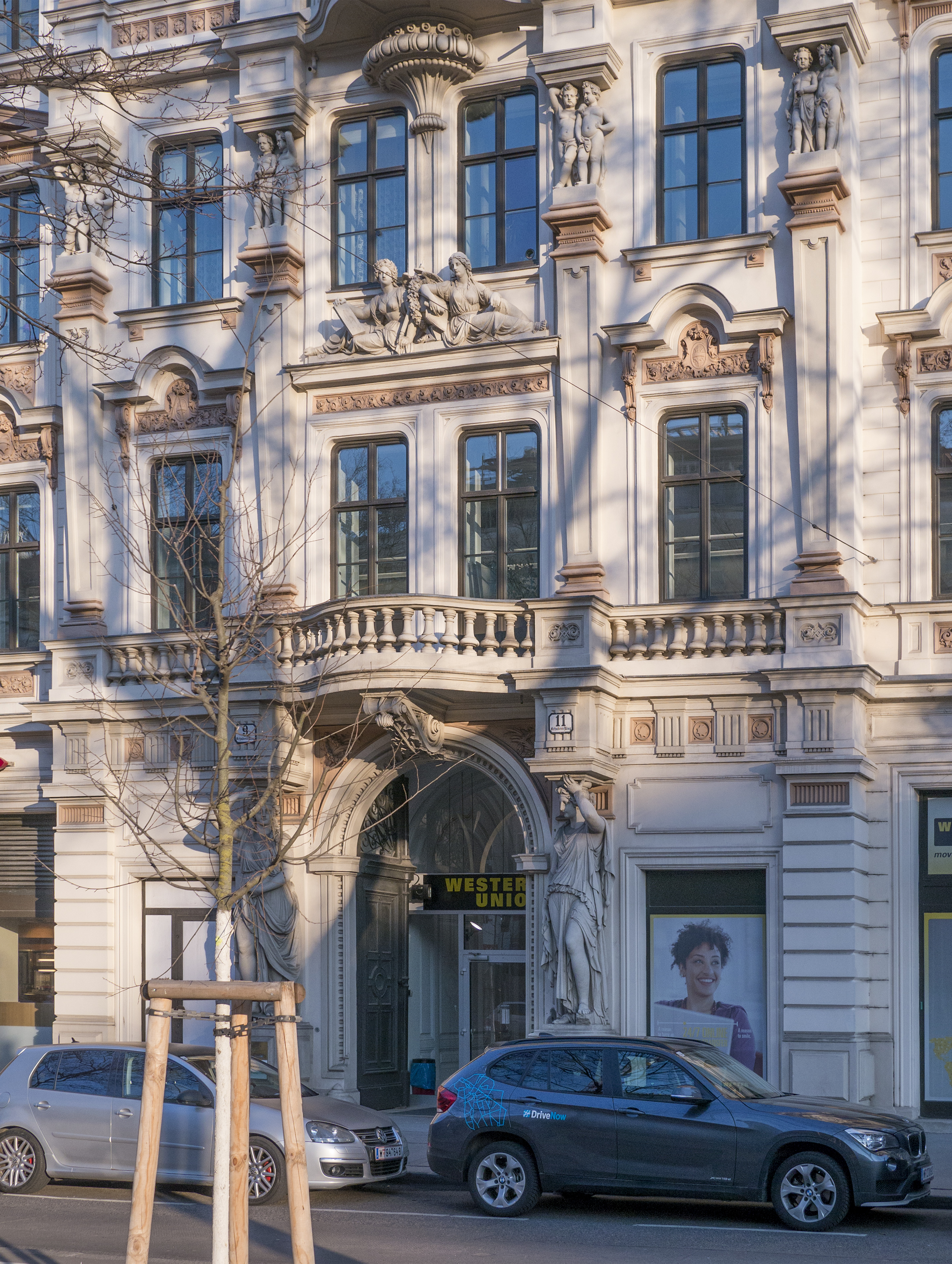 Christinenhof